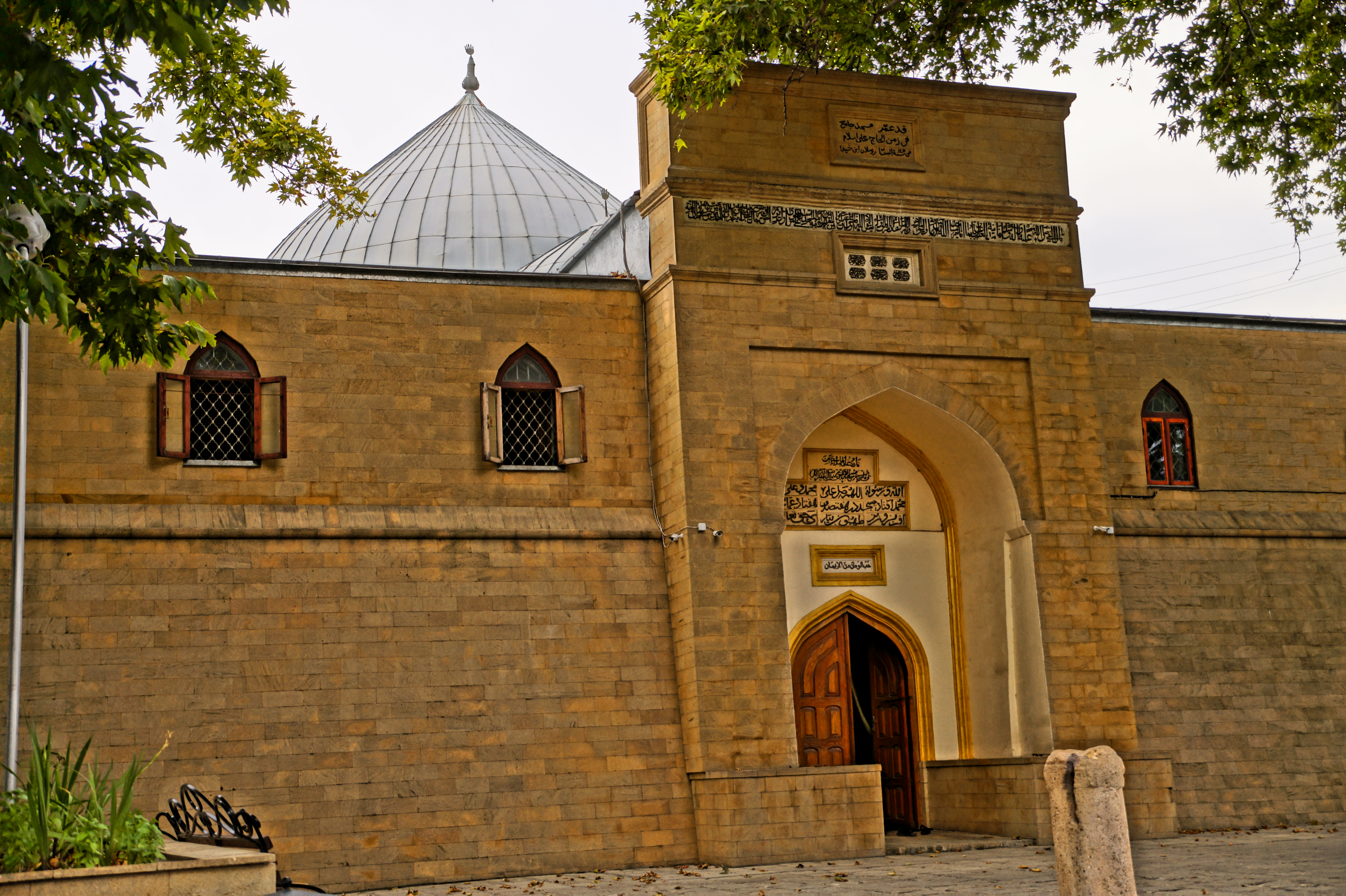 Мечеть: верхняя часть города, Айдынбекова улица, Дербент, Дагестан